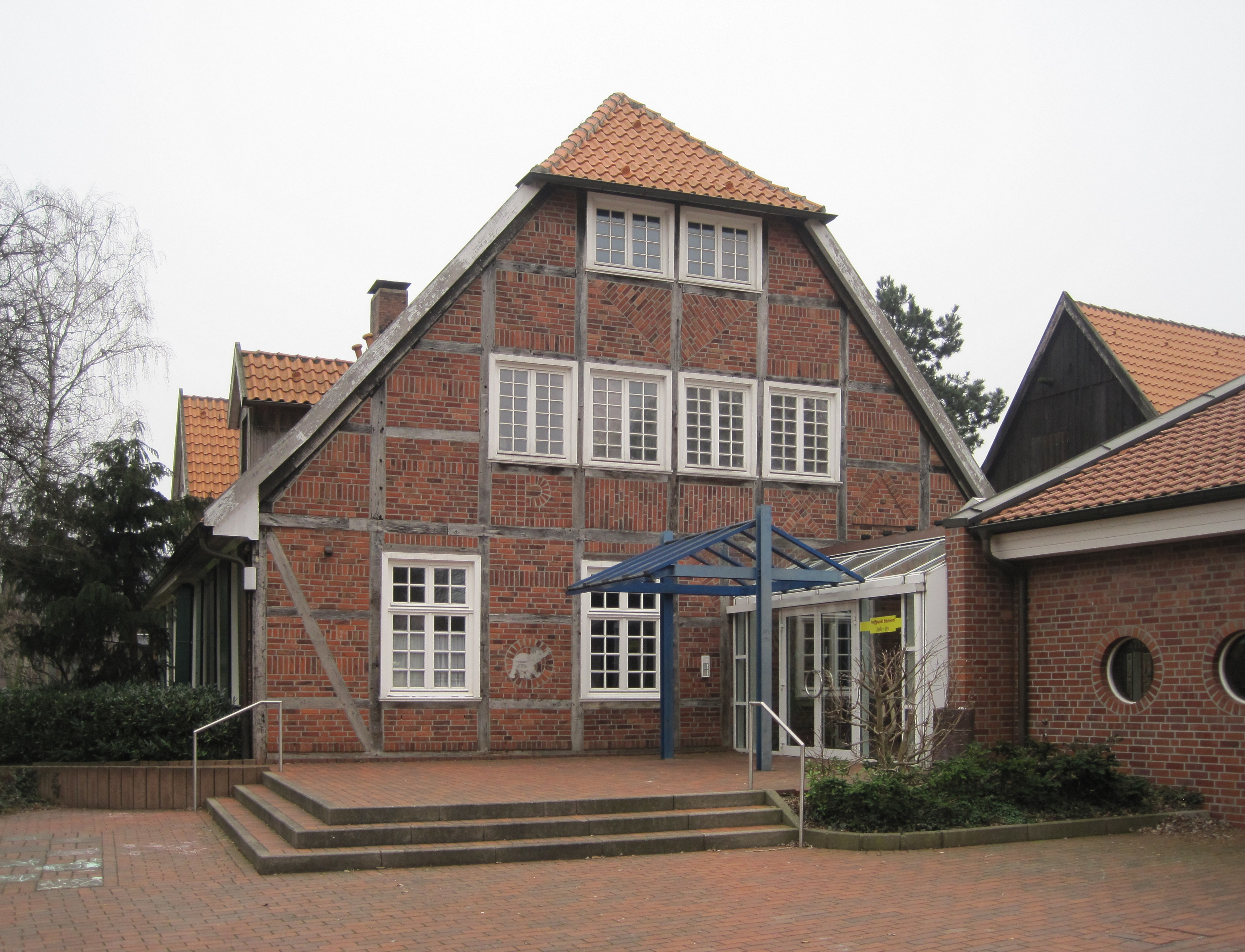 Das Foto zeigt die Vikare der Pankratiuskirche in Hamm-Bockum-Hövel.